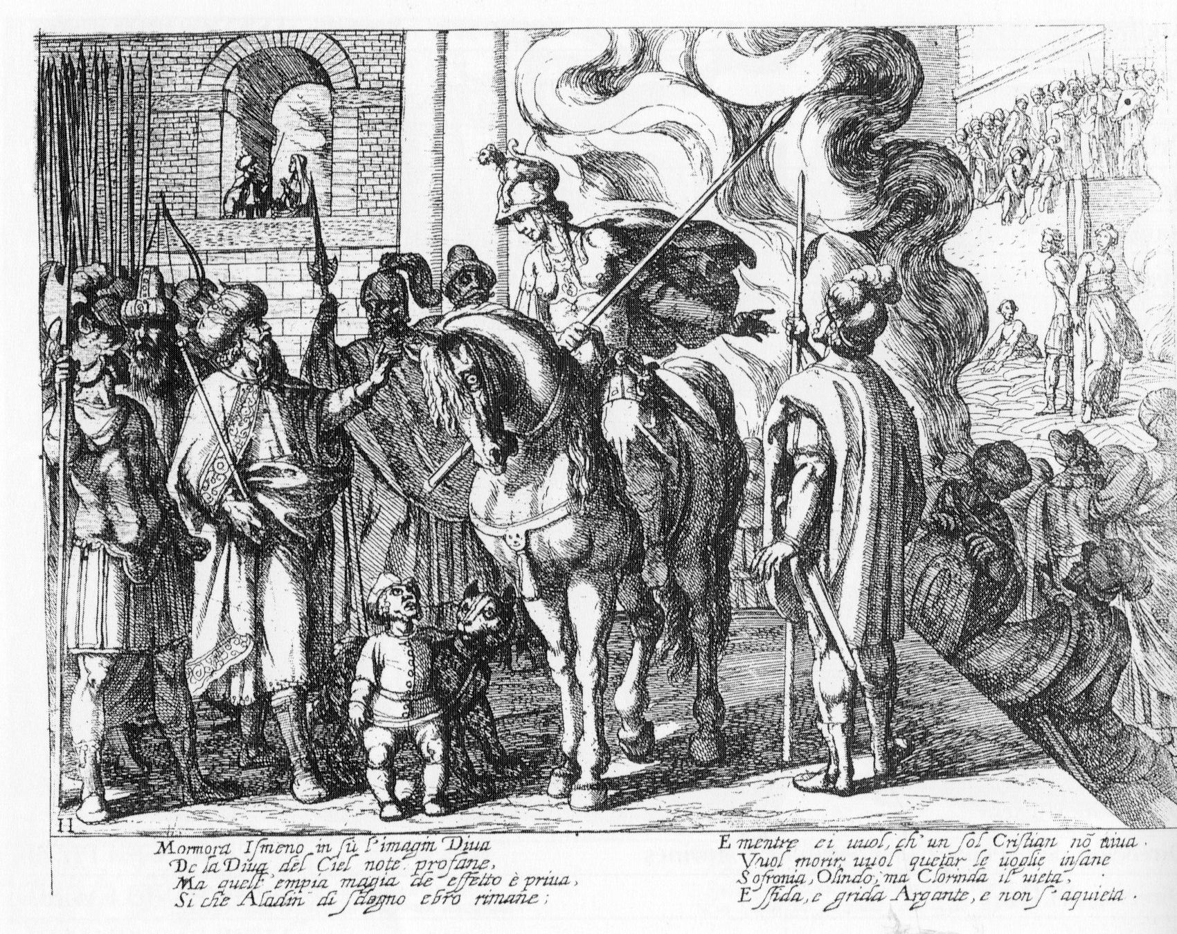 Antonio Tempesta, grabado para la Gerusalemme Liberata (Tasso)